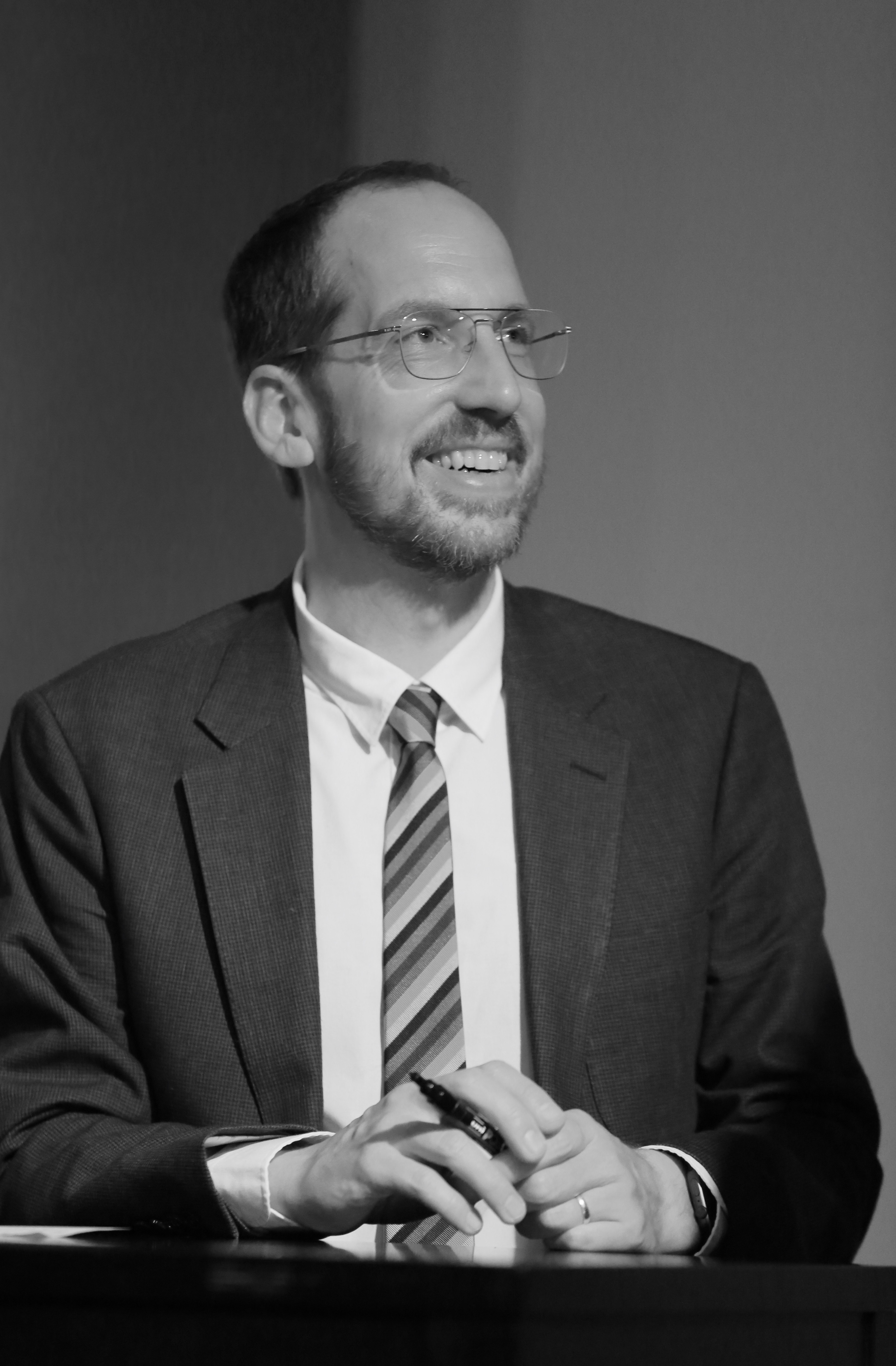 Christoph Niemann im Münchner Literaturhaus anläßlich der Eröffnung seiner Ausstellung "Im Auge des Betrachters" 9.11.2018 - 3..2.2019